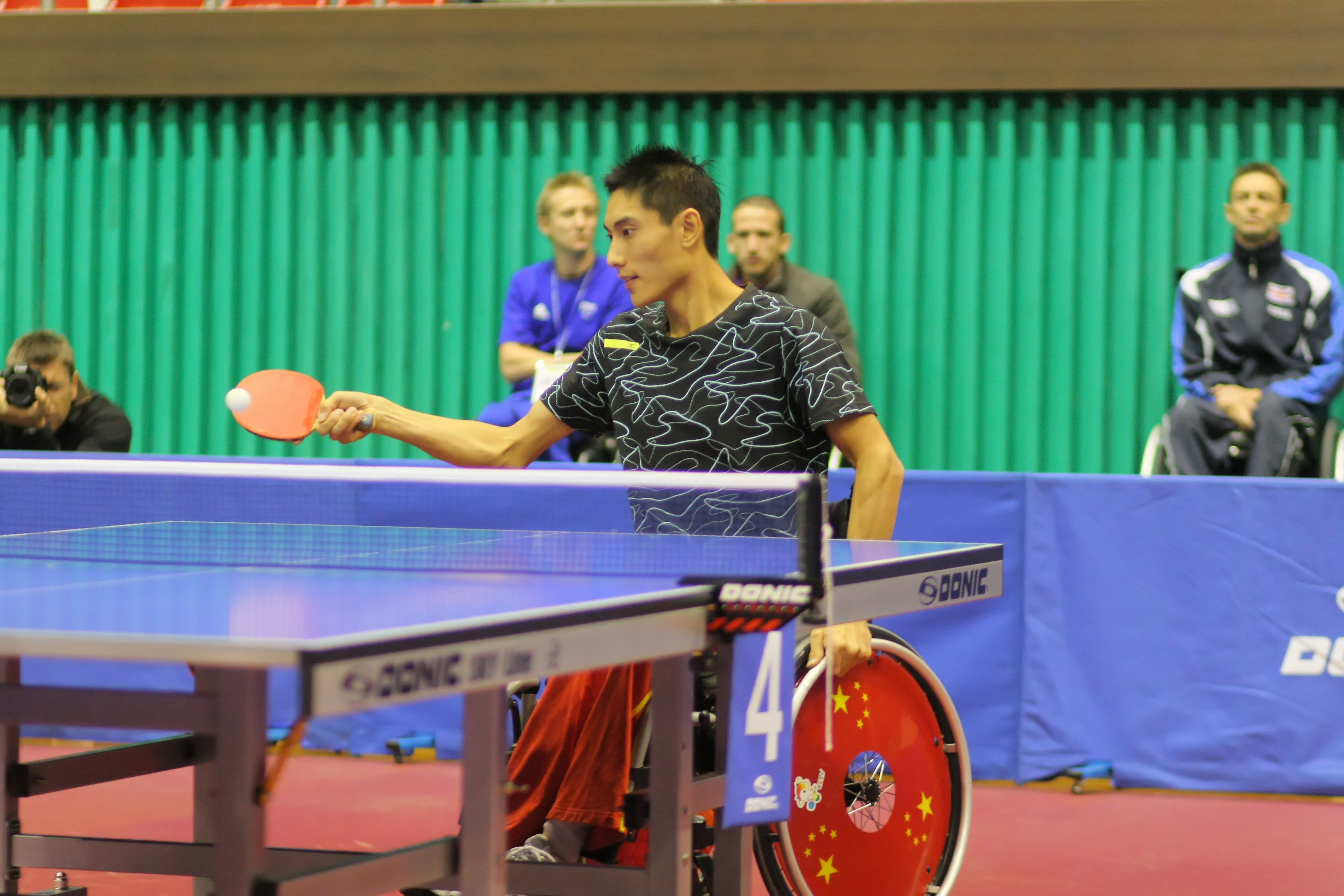 Pan Feng Feng (CHN)